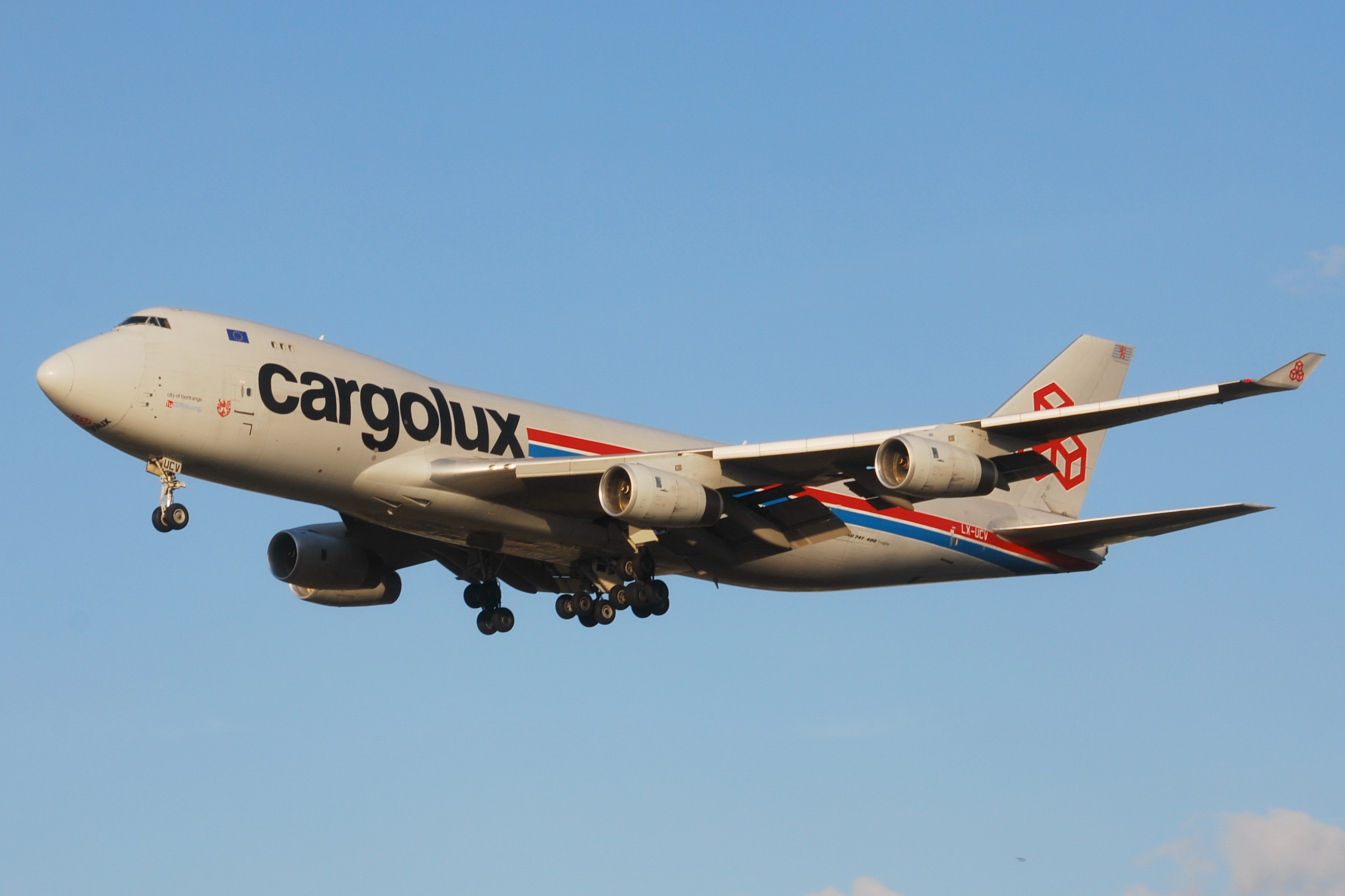 Photo prise à l'aéroport de Toulouse-Blagnac (LFBO) en France. Picture take at Toulouse-Blagnac Airport (LFBO) in France.